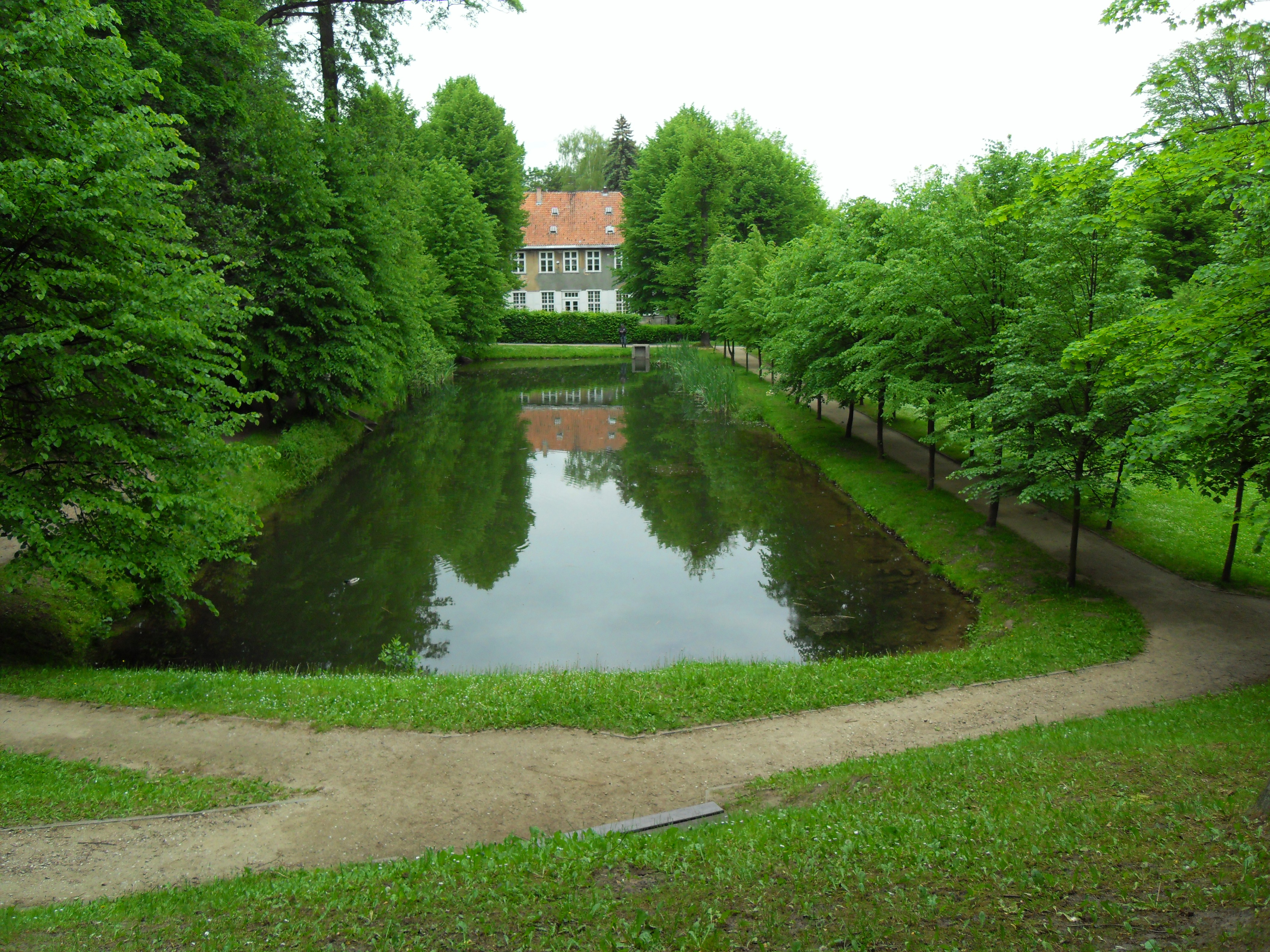 Gdańsk Wrzeszcz Górny, Park w Królewskiej Dolinie. W tle dwór Królewskiej Doliny.